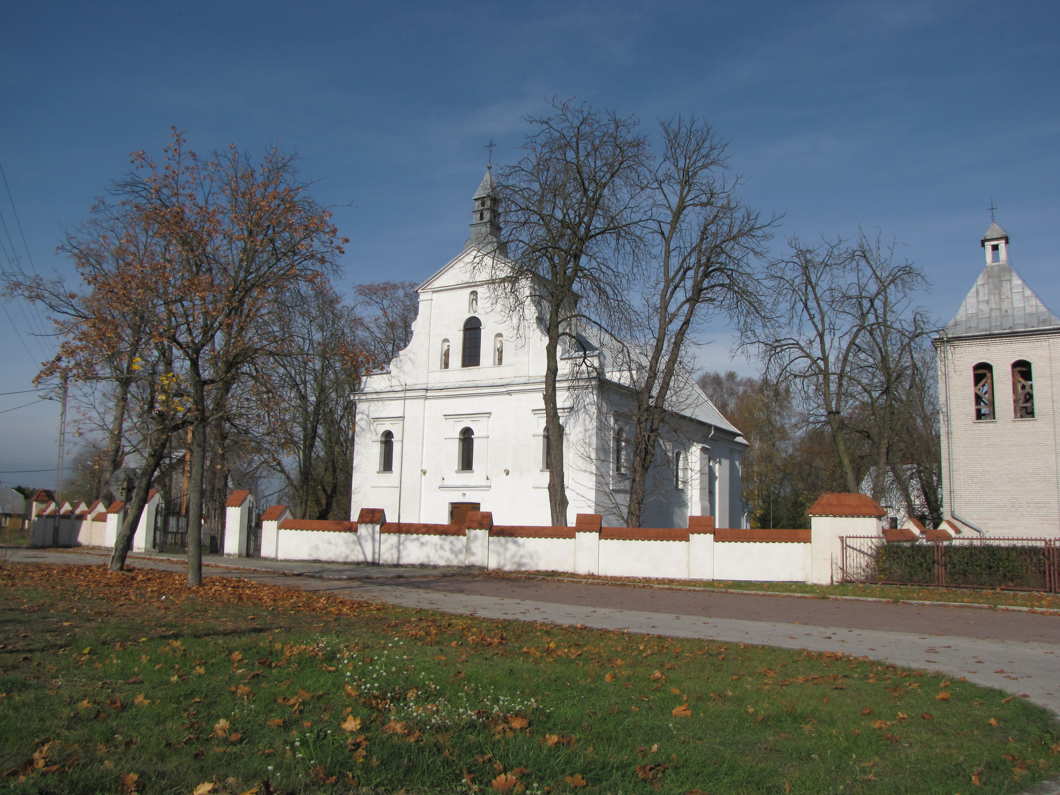 Kluczewsko, ul. Kościelna 7 - rzymskokatolicki kościół parafialny pw. św. Wawrzyńca, 1797, 1888